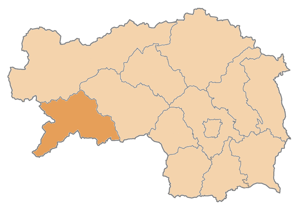 Karte: politischer Bezirk Murau Lizenz: GFDL Quelle: Zeichnung plp Datum: de:2004 Ort: Wien